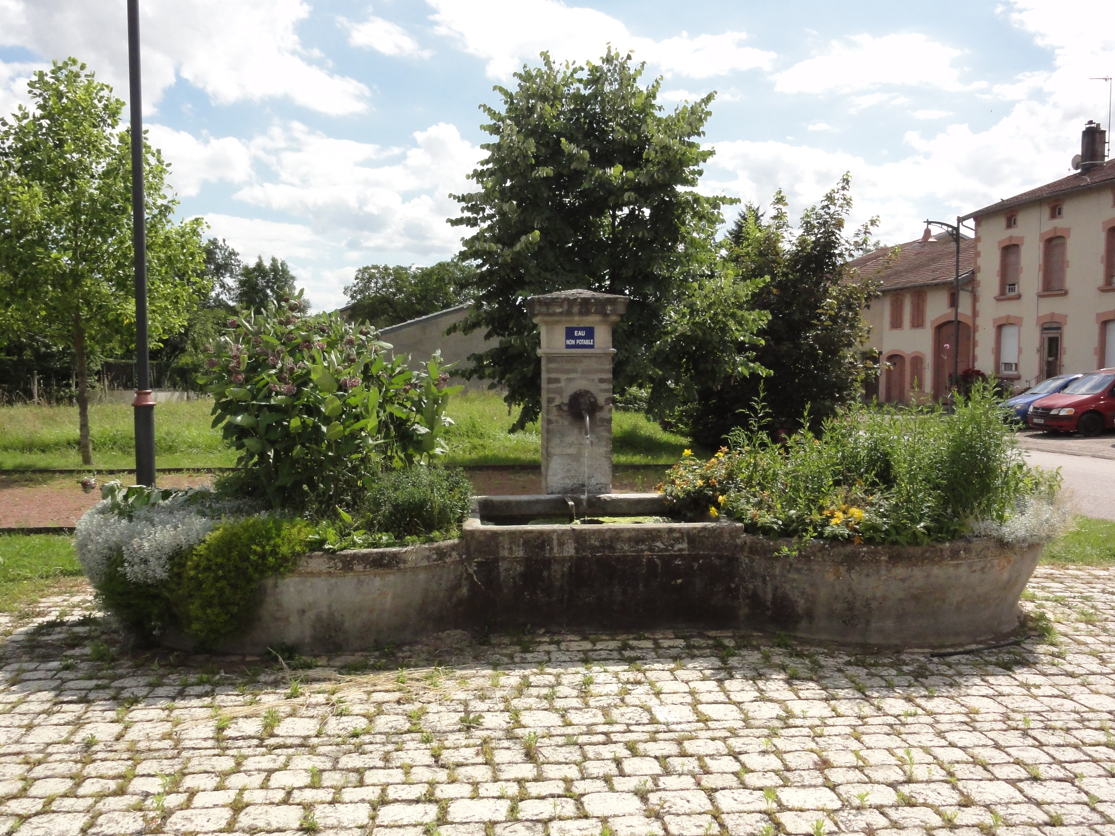 Saint-Martin (M-et-M) fontaine